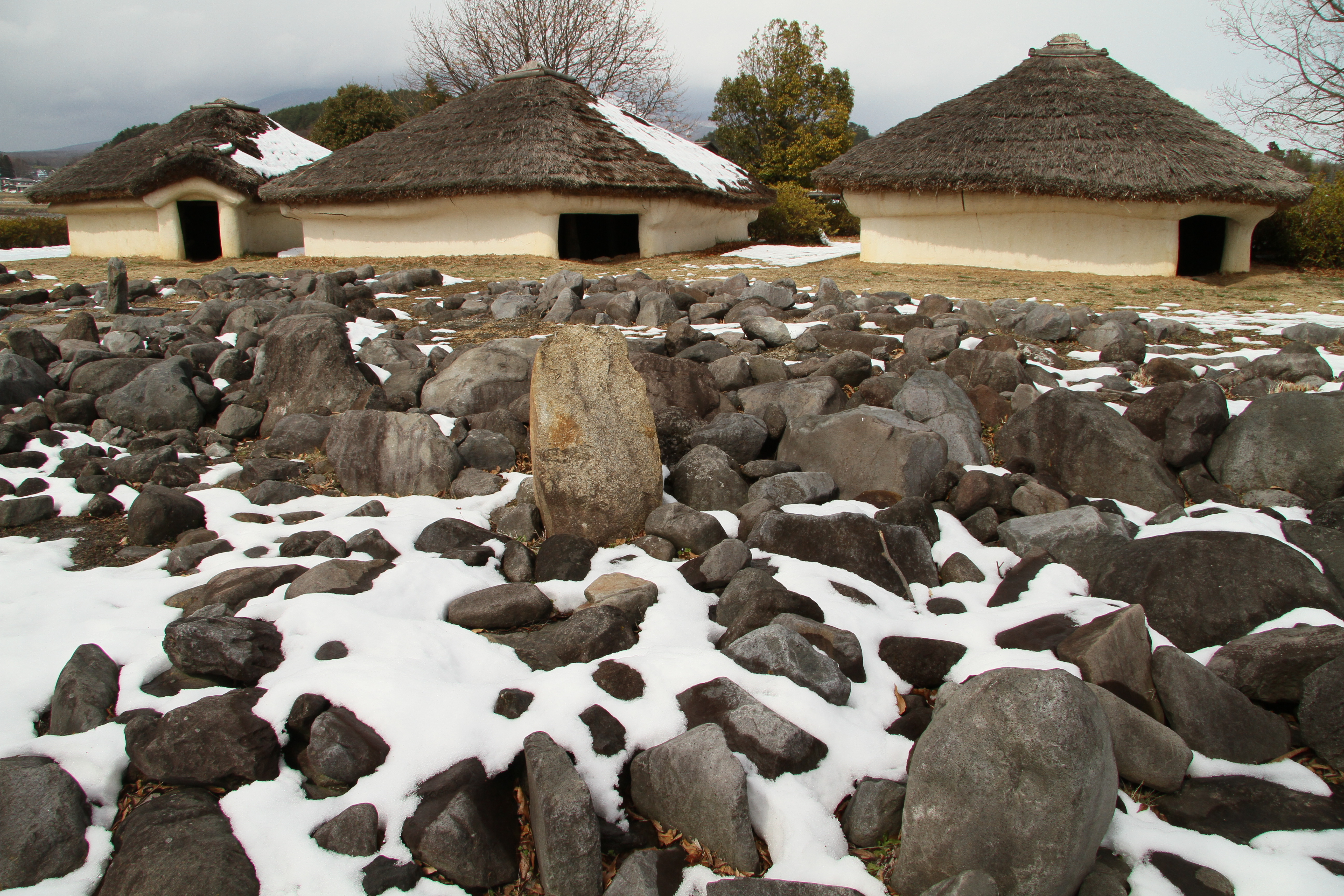 金生遺跡の復元住居と配石遺構